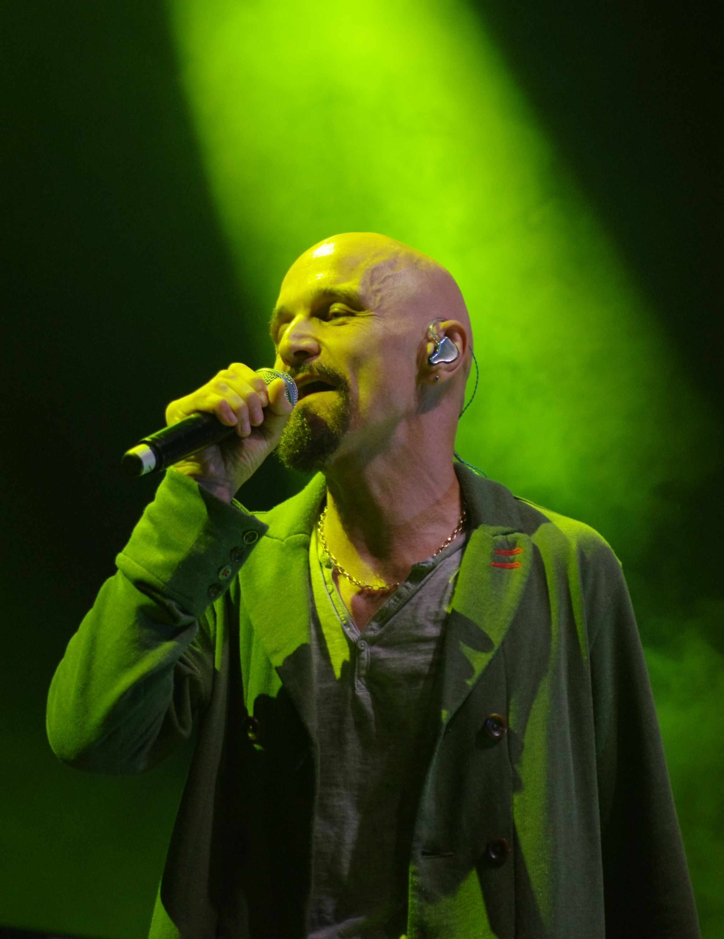 James (band) auf dem Haldern Pop Festival 2013. Hauptbühne. Besetzung: Tim Booth (Gesang) Jim Glennie (Bass) Larry Gott (Gitarre) Saul Davies (Gitarre, Violine, Percussion) Mark Hunter (Keyboards) Dave Baynton-Power (Schlagzeug) Andy Diagram (Trompete, Percussion)